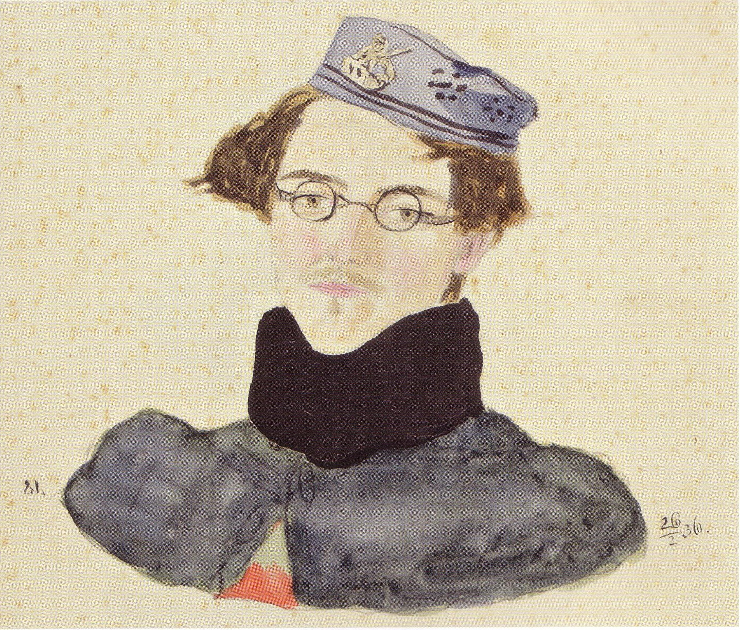 Aquarellporträt von Friedrich David Michaelis (1813-1892) als Student in Königsberg, Angehöriger der Corpslandsmannschaft Scotia